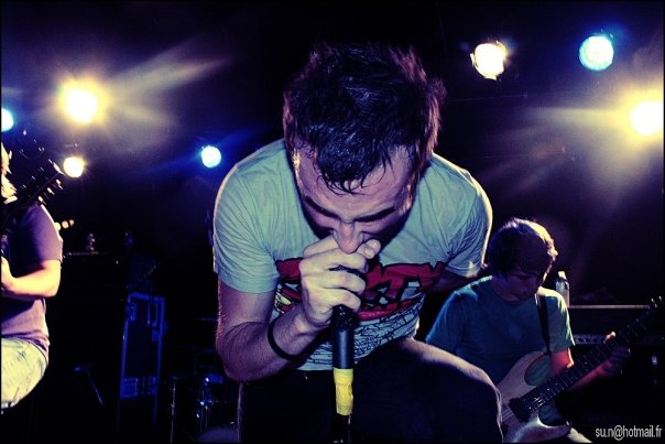 Jake Luhrs, Paris.